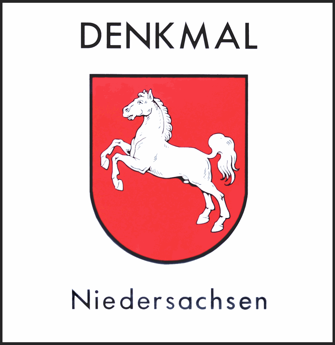 Denkmalschutzplakette Niedersachsen